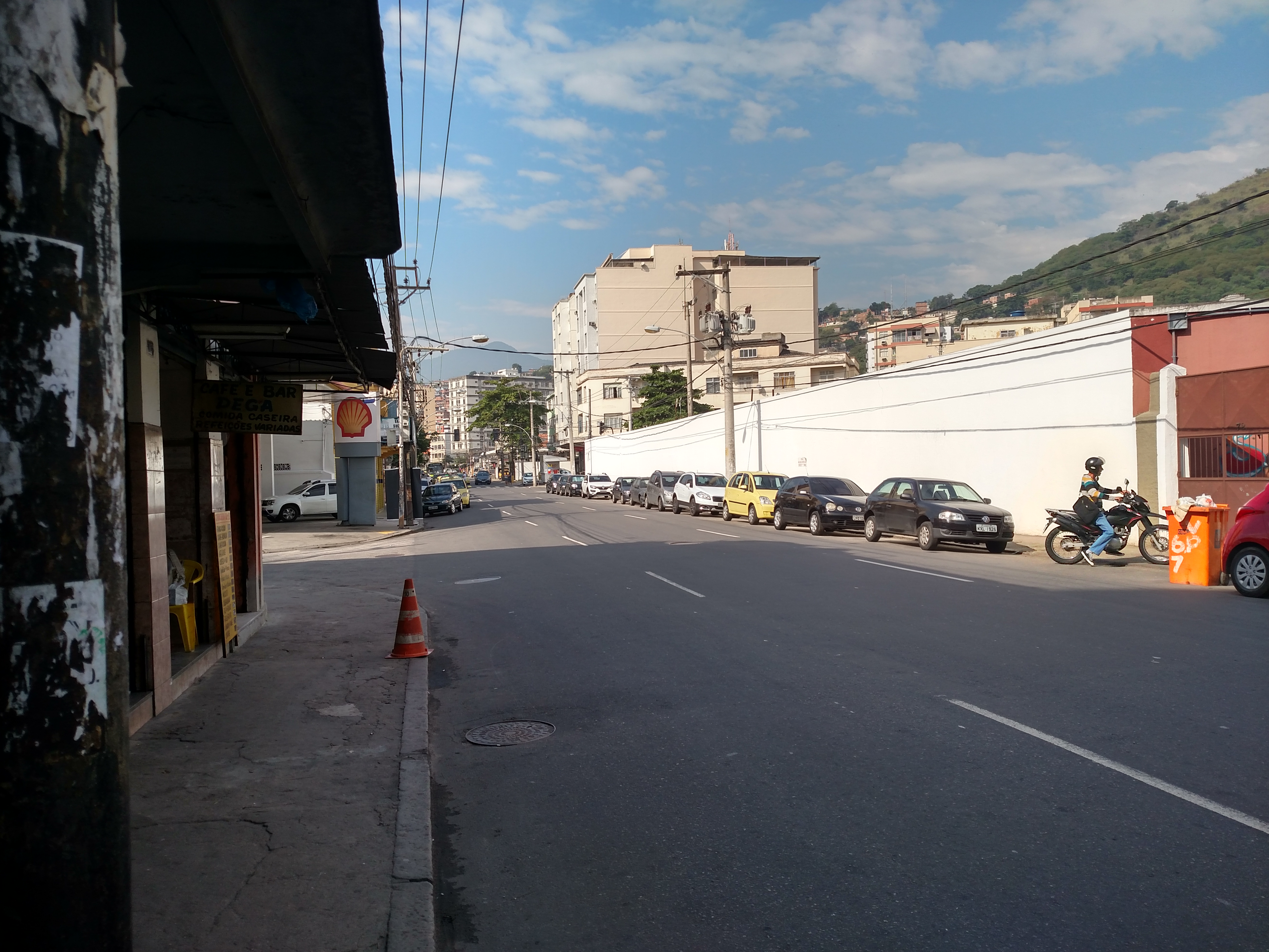 Rua barão do bom retiro proximo ao nª 726